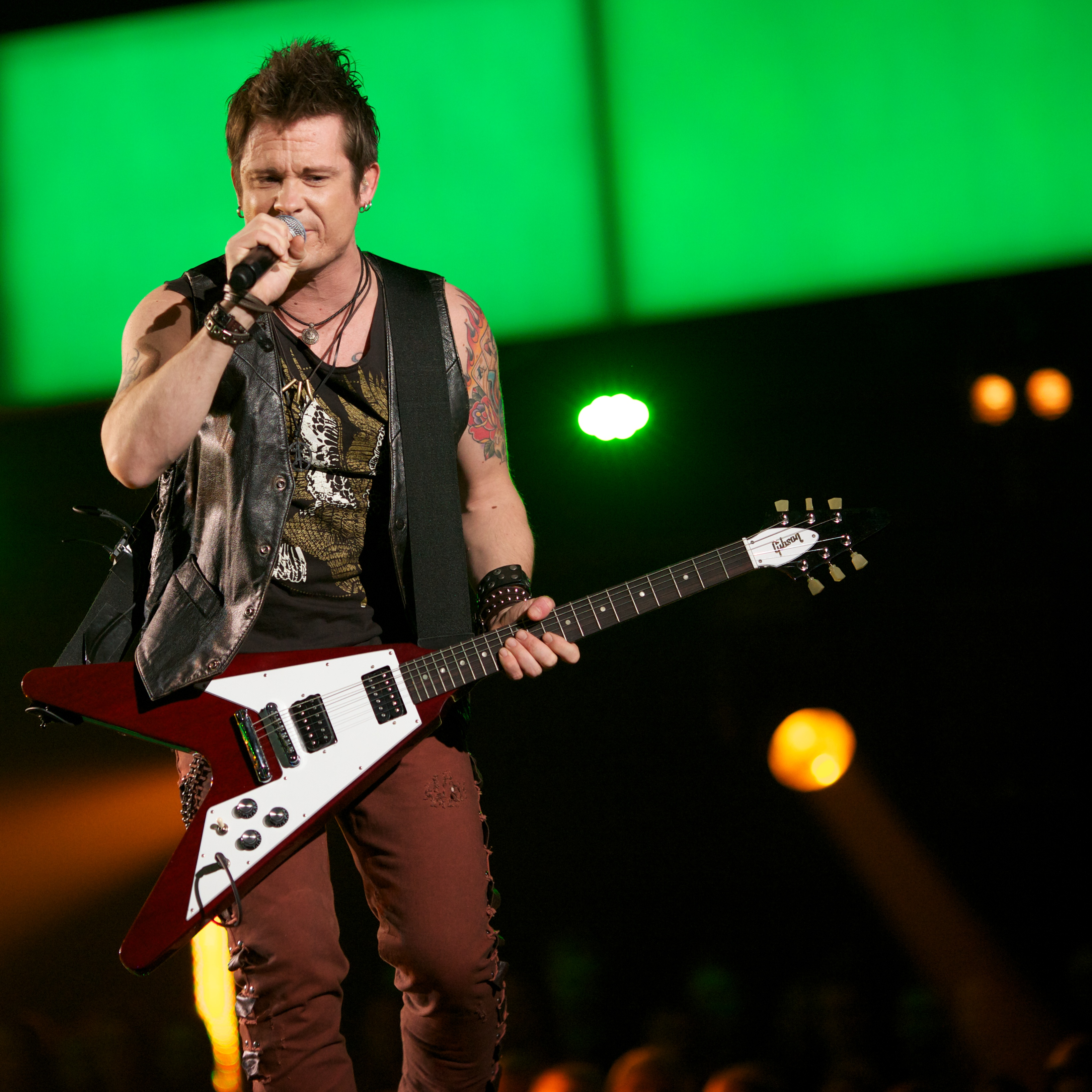 MGP 2012 delfinale i Larvik